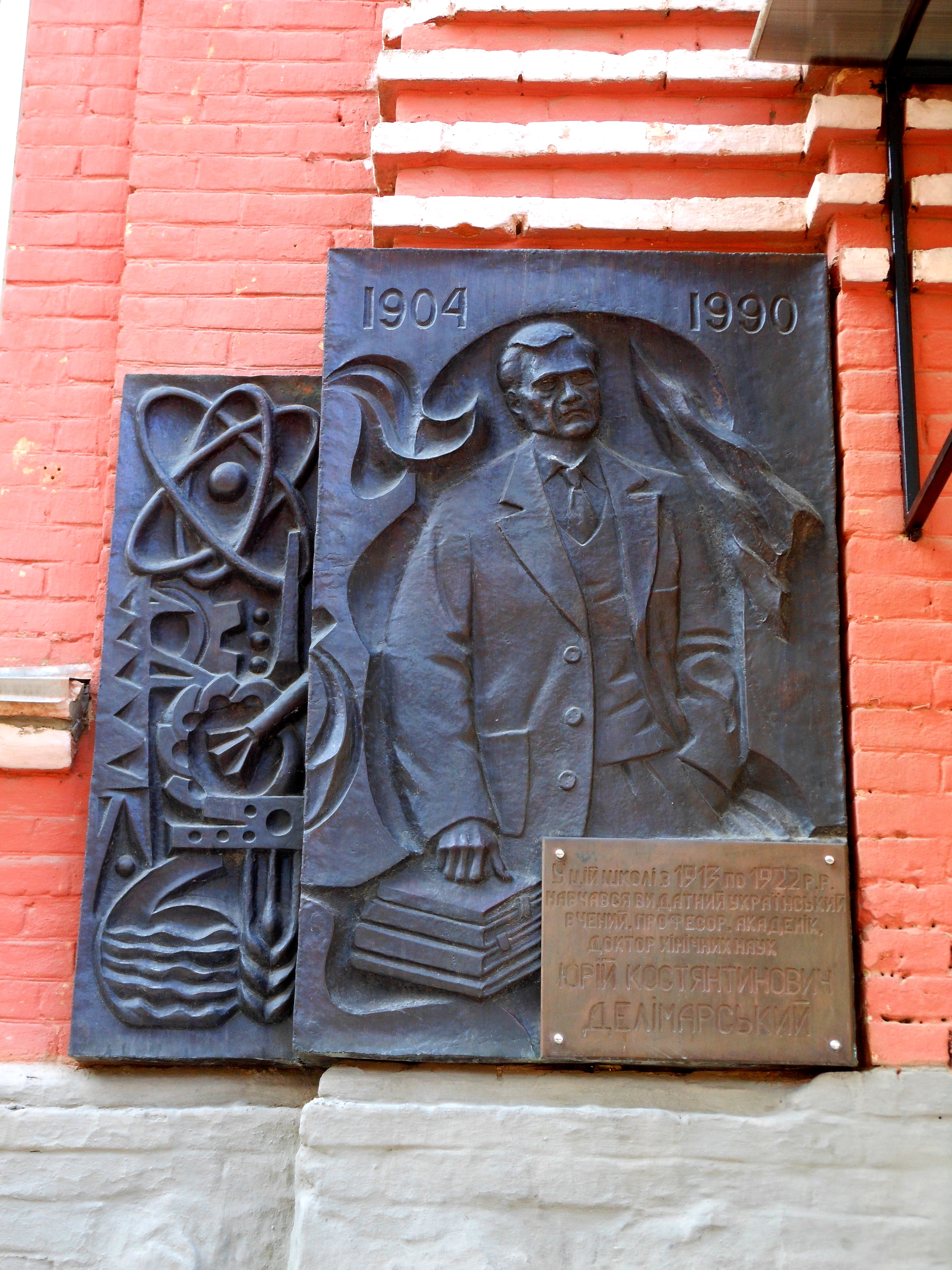 Будинок реального училища, Бар, вул. Пролетарська,5/4